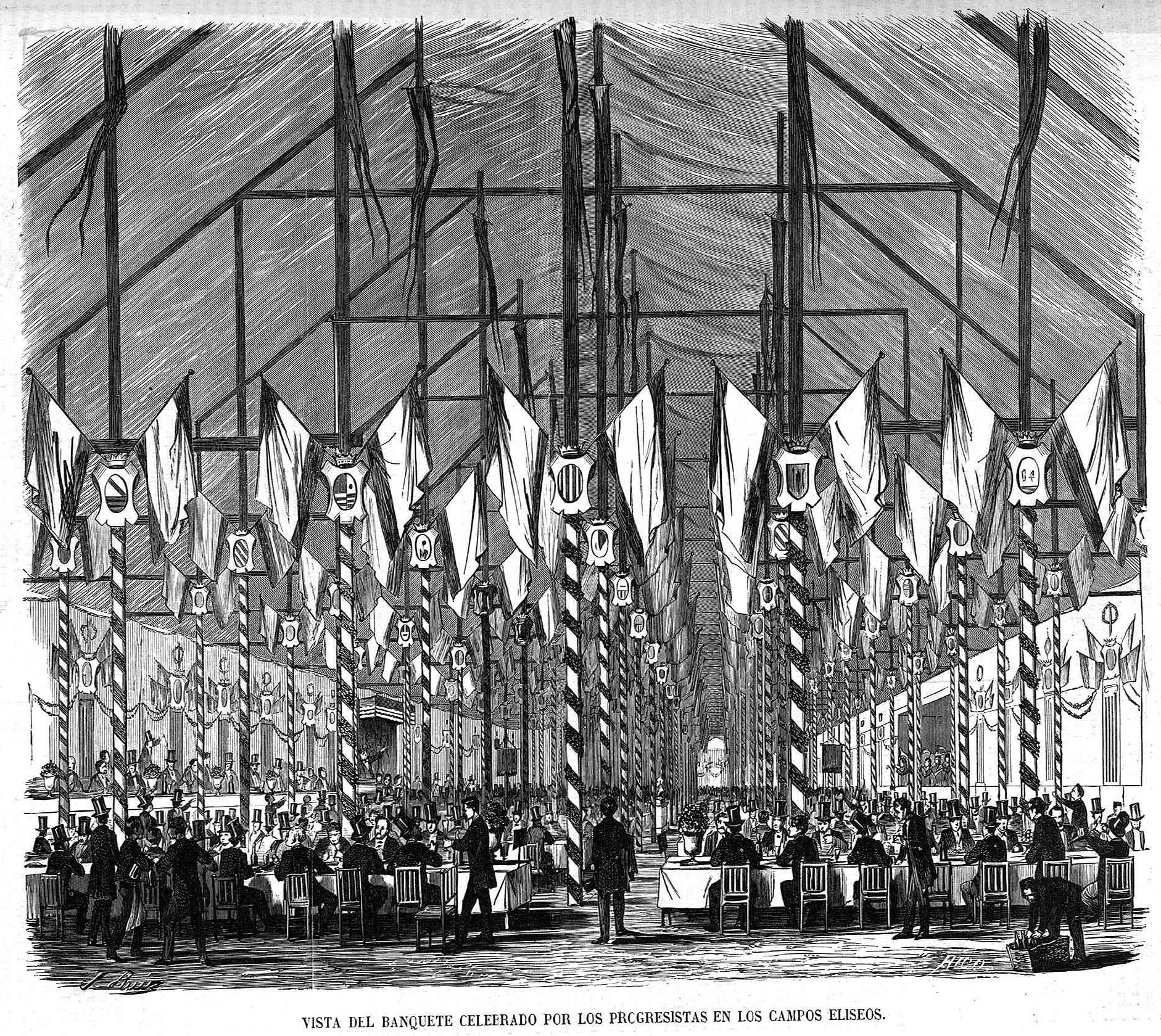 «Vista del banquete celebrado por los progresistas en los Campos Elíseos» el 3 de mayo de 1864, en la revista española El Museo Universal.